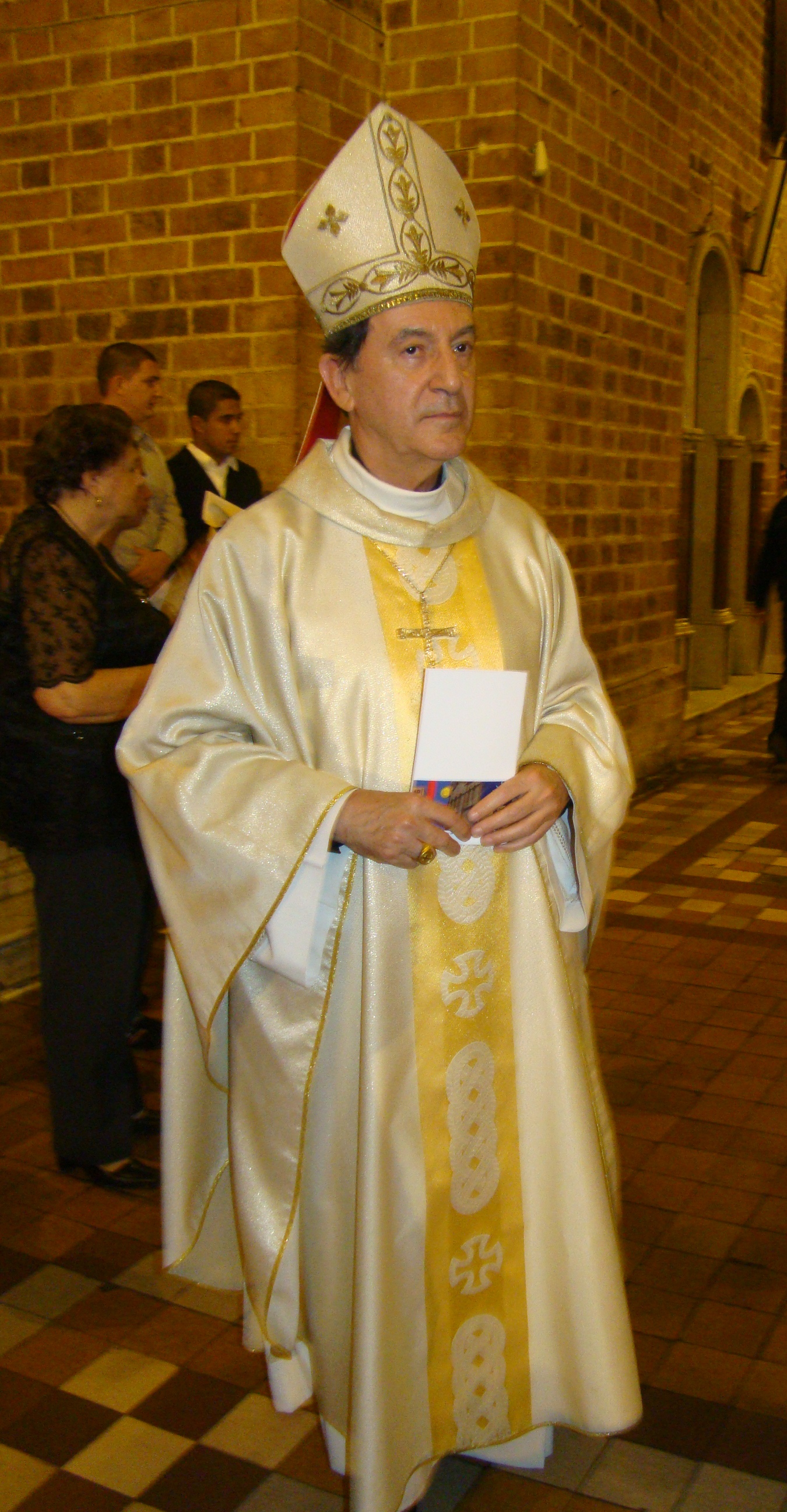 Monseñor Rubén Salazar Gómez, arzobispo de Bogotá en la Catedral de Medellín durante la ordenación episcopal de los presbíteros Edgar Aristizábal Quintero y Hugo Alberto Torres Marín como obispos auxiliares de Medellín